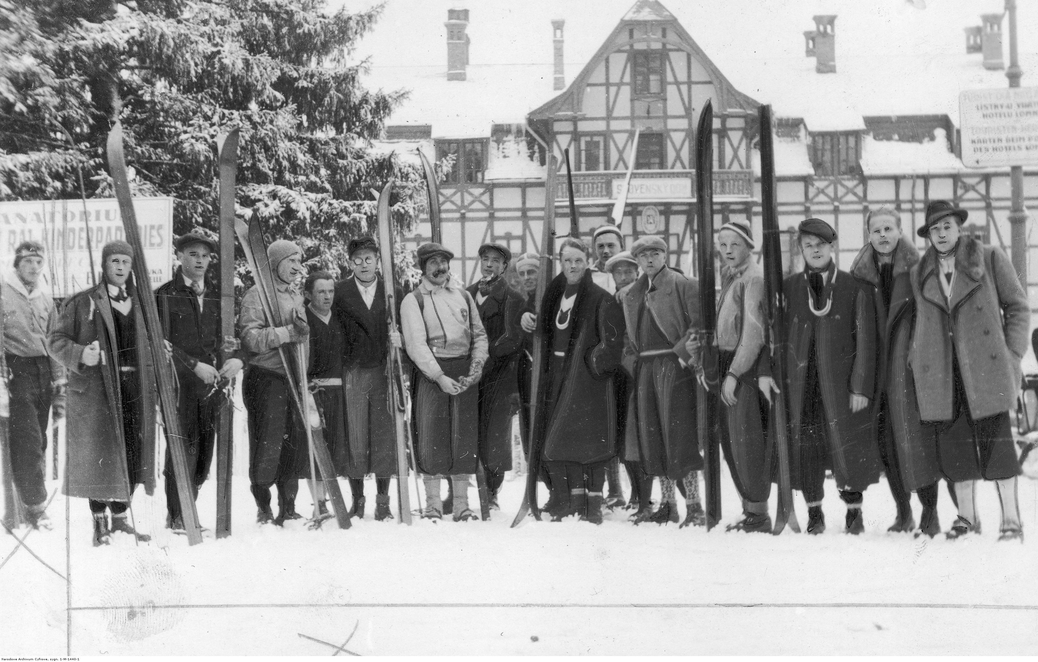 Mistrzostwa Świata w Narciarstwie Klasycznym FIS w Wysokich Tatrach. Reprezentacja Polskiego Związku Narciarskiego - Bursa, Marian Woyna-Orlewicz, kierownik drużyny Józef Openheim, Lesław Berych, trener UZN p. Waage, zastępca kierownika drużyny p. Zylberman, Górski, Mrowca, Bronisław Czech (z nartami), Tadeusz Wowkonowicz, Jan Haratyk, Andrzej Marusarz, Stanisław Marusarz, Fedor Weinschenk. 1935-02 (Koncern Ilustrowany Kurier Codzienny - Archiwum Ilustracji)